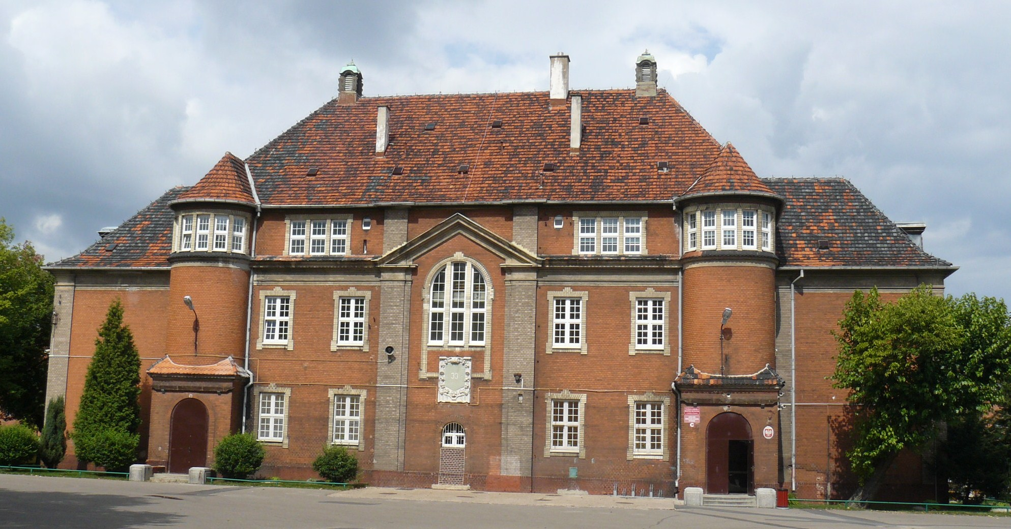 Poznań Łazarz - zespół zabudowań szkolnych (zabytek nr A 258).